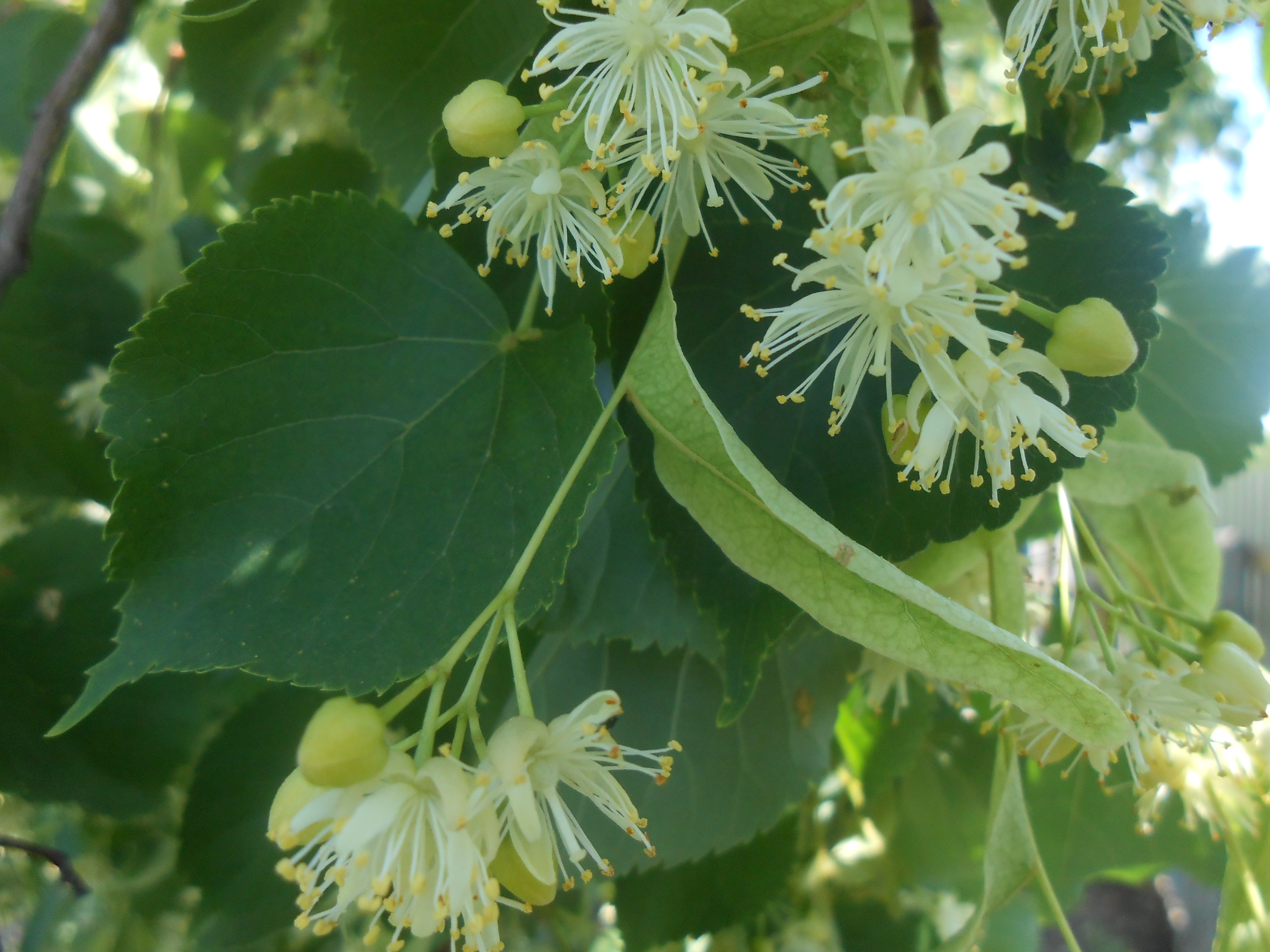 Цветение липы. Июнь 2014 Башкортостан